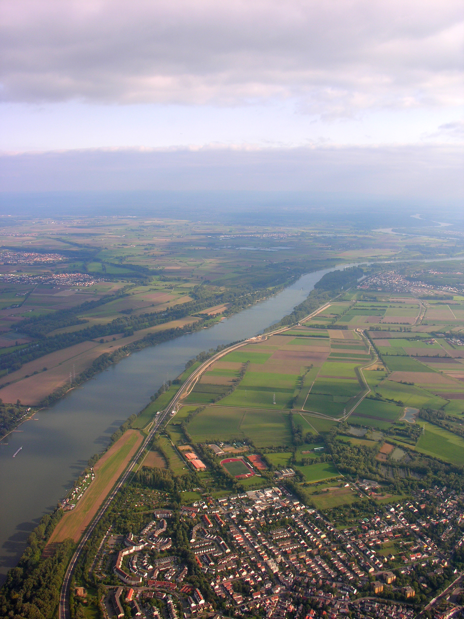 Aerial View of Mainz-Laubenheim